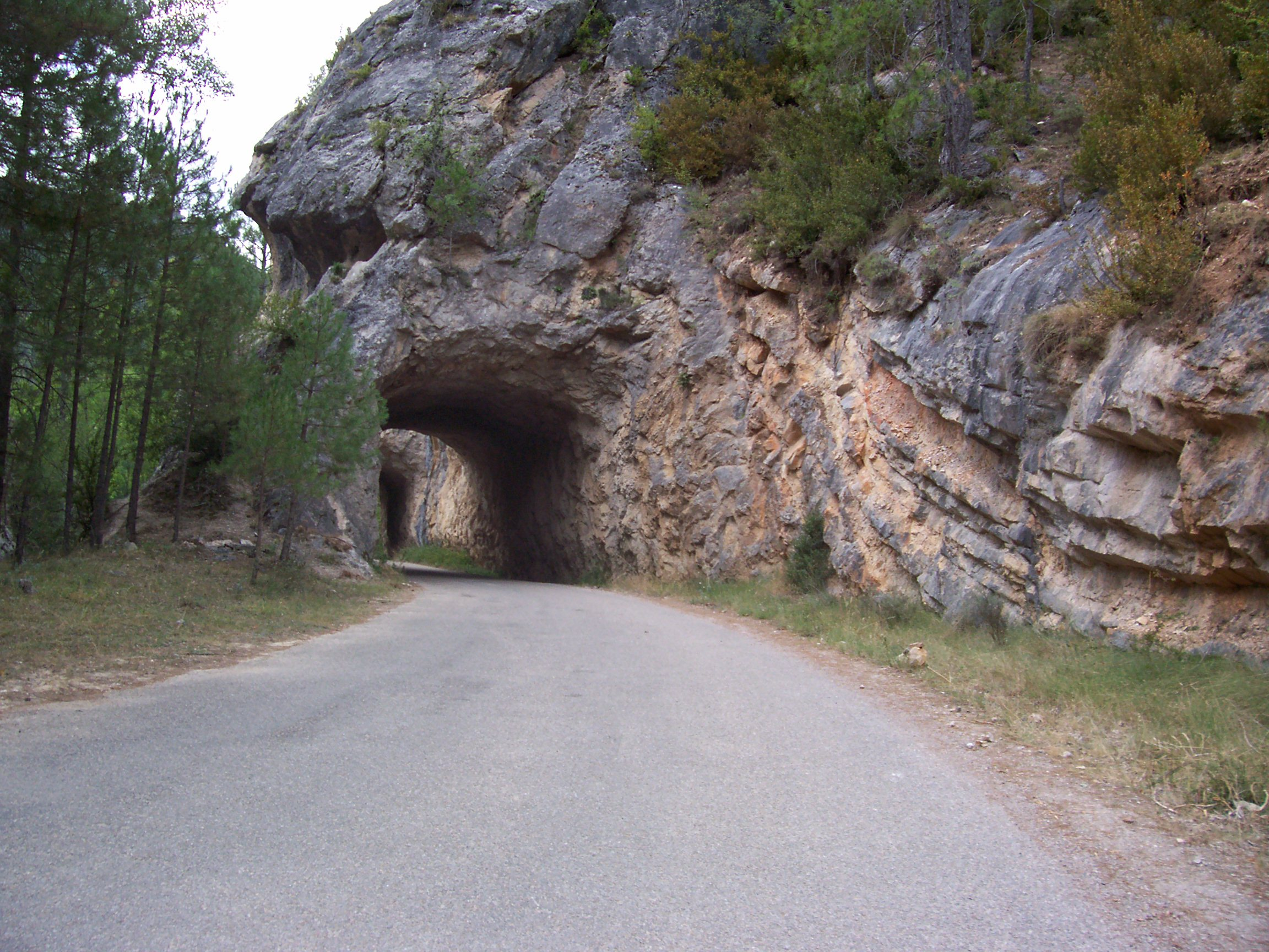 Serranía de Cuenca This is a photography of a Site of Community Importance in Spain with the ID: ES4230014. Natura2000 entry, EEA entry